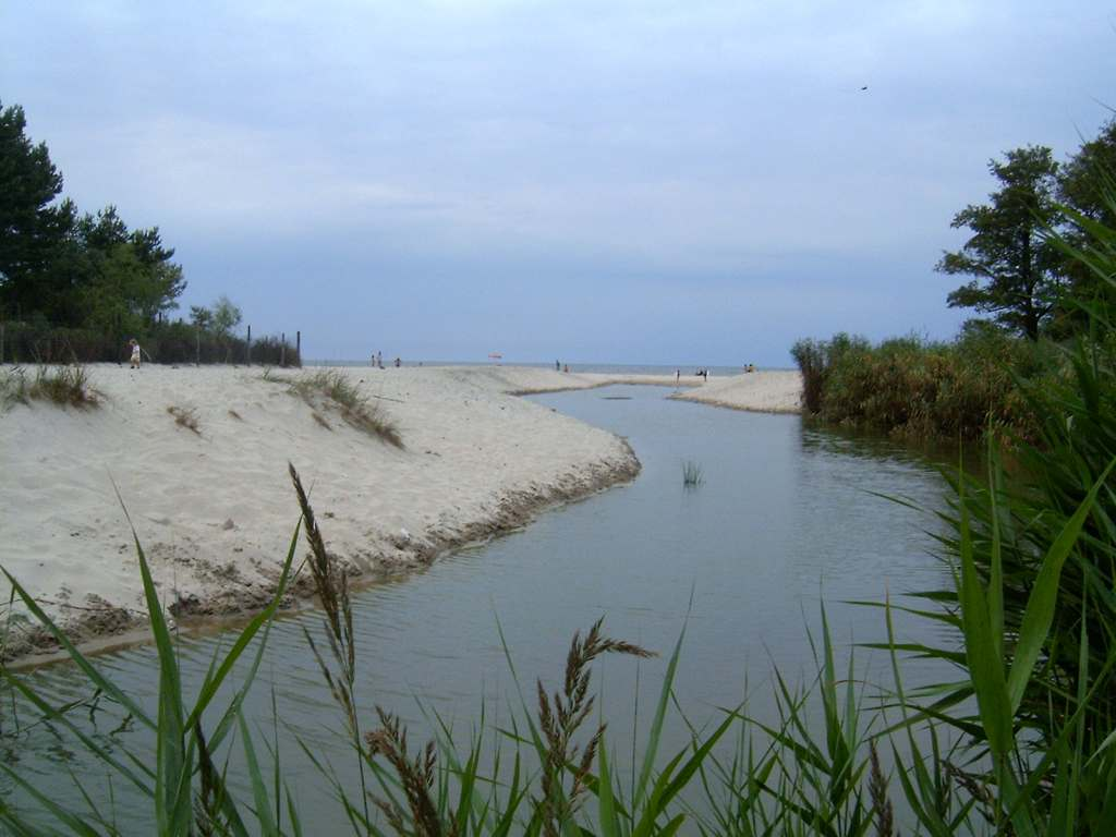 Kanał Liwia Łuża w Niechorzu